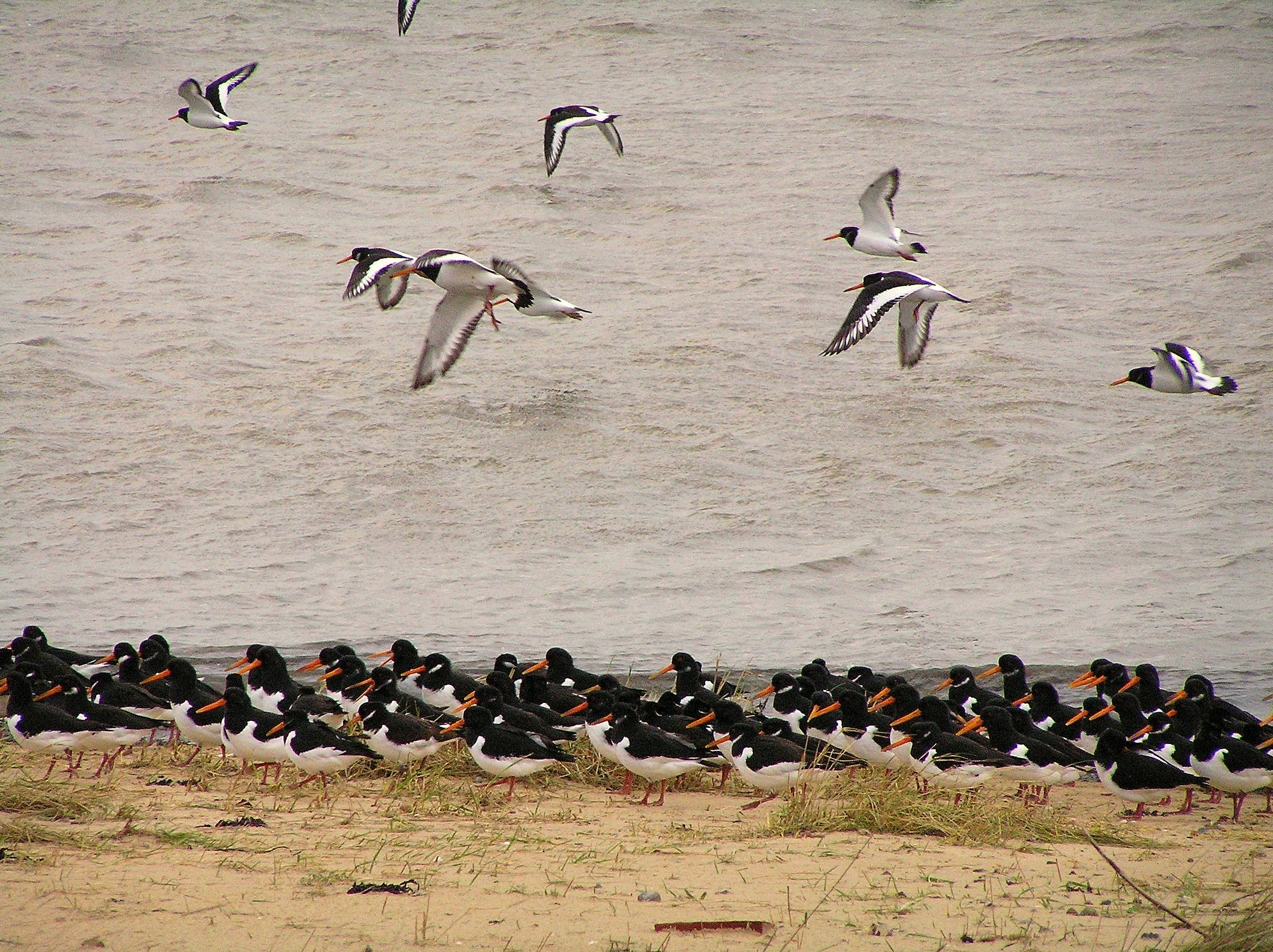 Austernfischer im Flug und am Boden am südlichen Ortsrand von Nebel (Amrum) am Saum des Wattenmeeres. Sie ruhen dort regelmäßig im Windschatten in großen Kolonien (1000 und mehr Vögel während der Überwinterung)